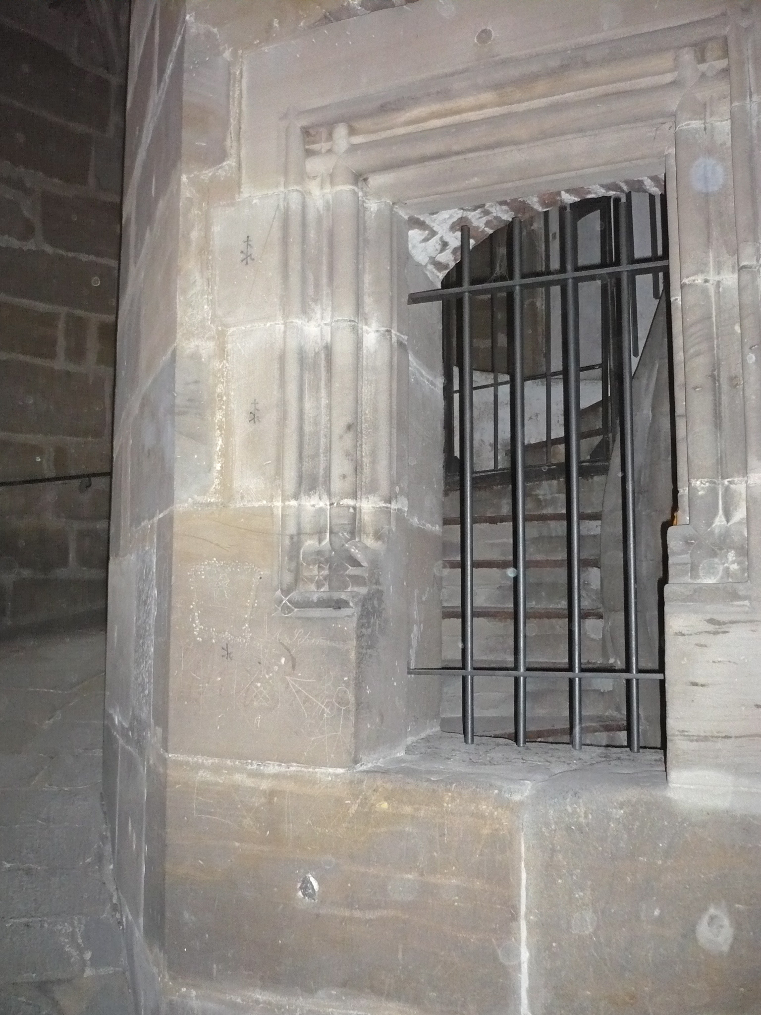 Schlossturm Bayreuth Treppe und Auffahrt